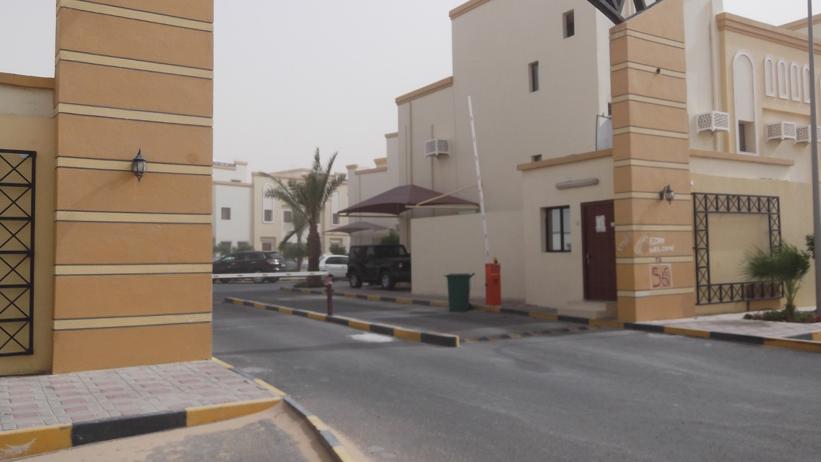 Ezdan Villa 56, Al wakra